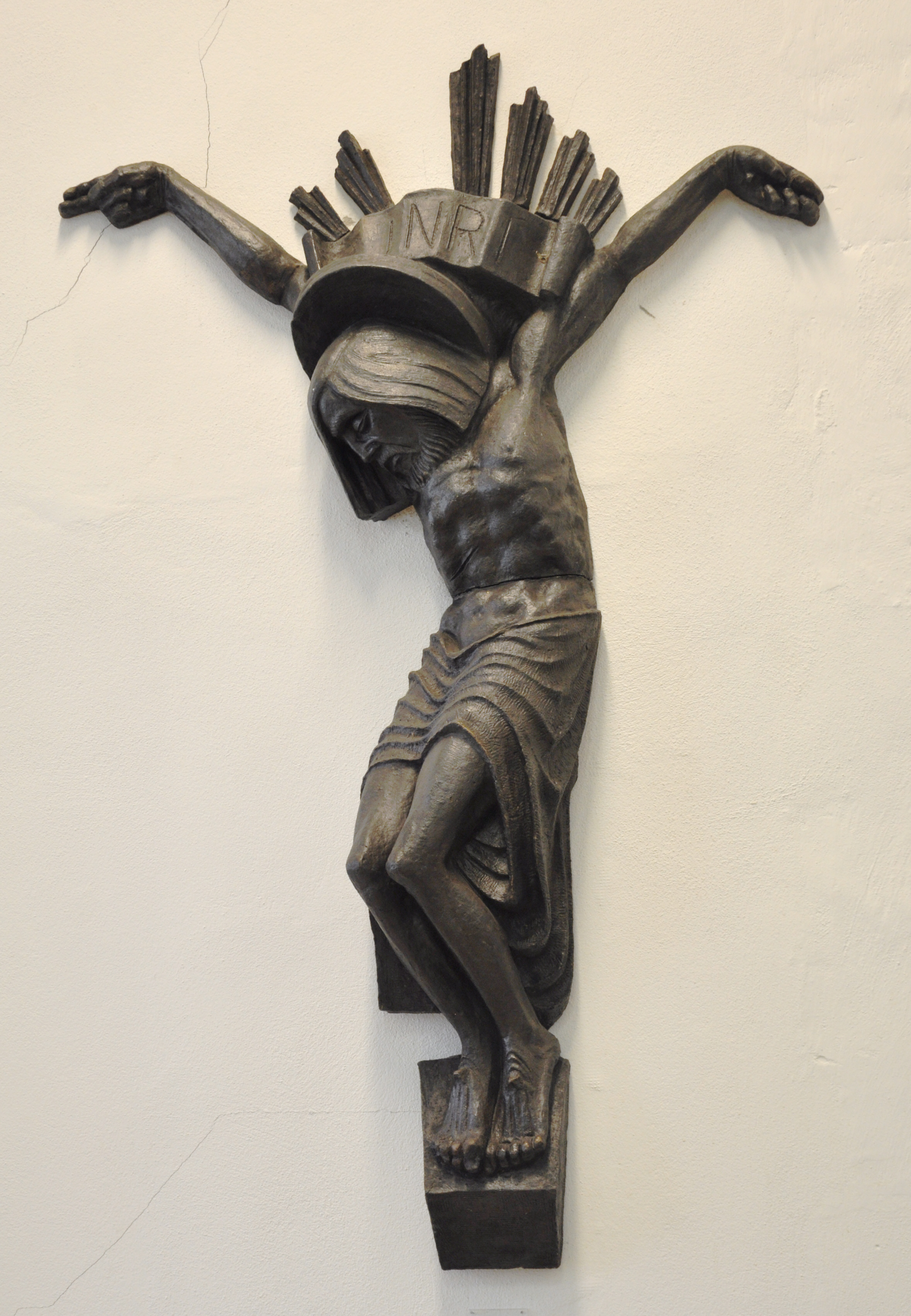 Museum Senftenberg (im Schloss Senftenberg), Industrieabteilung Richard Adolf Zutt (1887-1938): Christus, aus Ilse-Klinker, 1920er/1930er Jahre